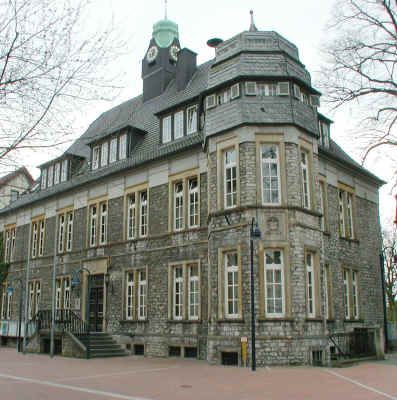 Rathaus der Stadt Lage, Nordrhein-Westfalen, Deutschland.